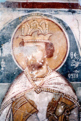 Фреска на Теодор Стратилат от "Св. св. Теодор Тирон и Теодор Стратилат" в Сервия.